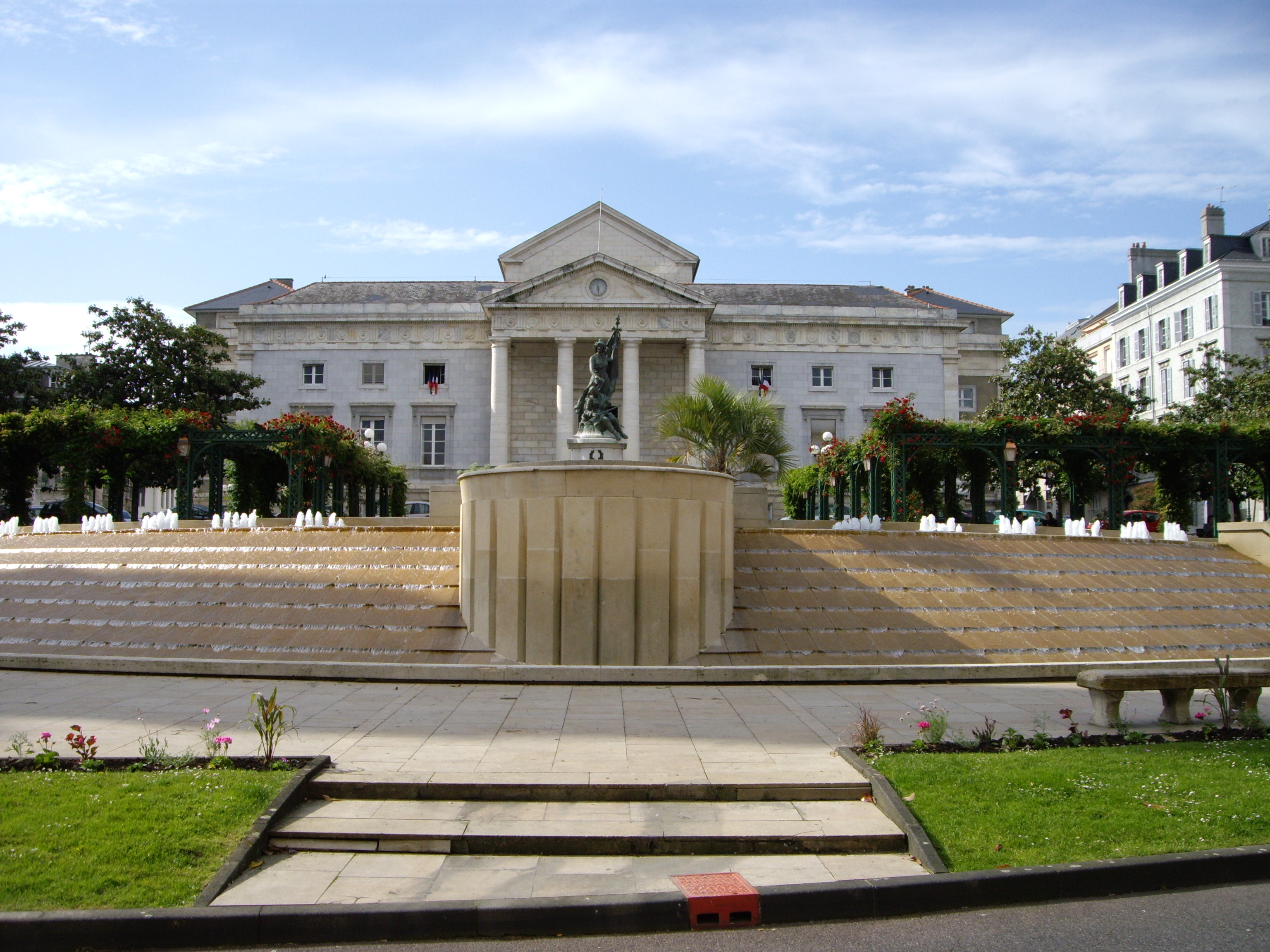 Palais de justice et place de la Libération (Pau, Pyrénées-Atlantiques, France).